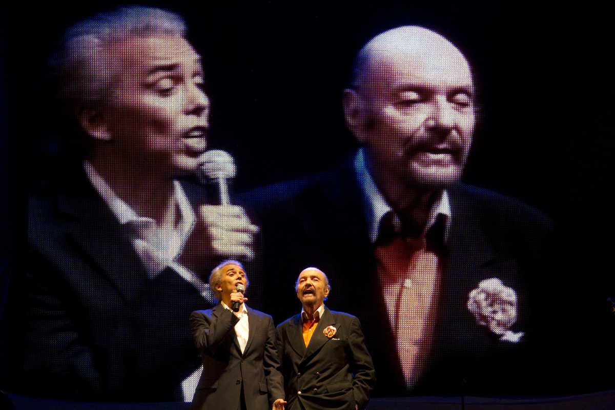 Jairo, Luego de cantar solo, lo hizo junto a Ferrer. ( Foto: Estrella Herrera)